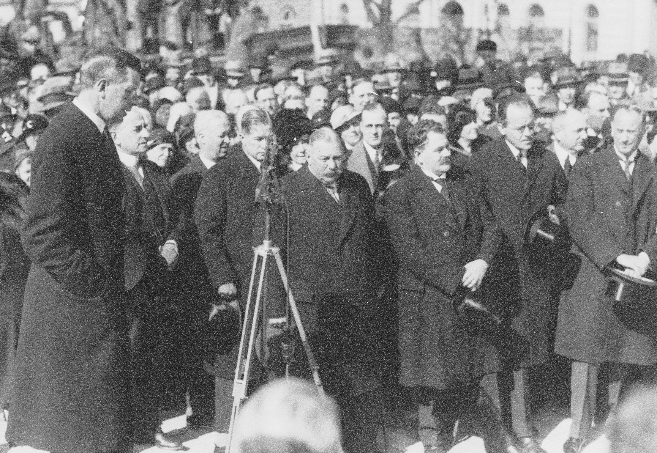 Eastmaninstitutet, grundstensläggning